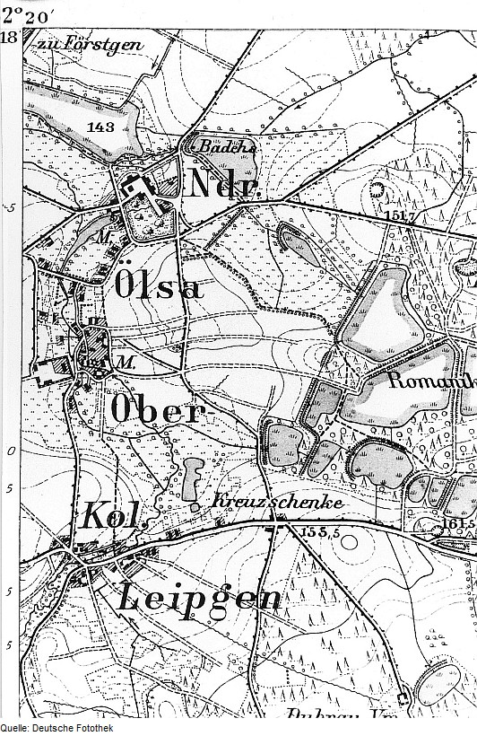 Original image description from the Deutsche Fotothek Mücka-Förstgen-Ost (vormals Ober- und Nieder Ölsa). Meßtischblatt, 1:25.000, Sekt. Niesky, 1886